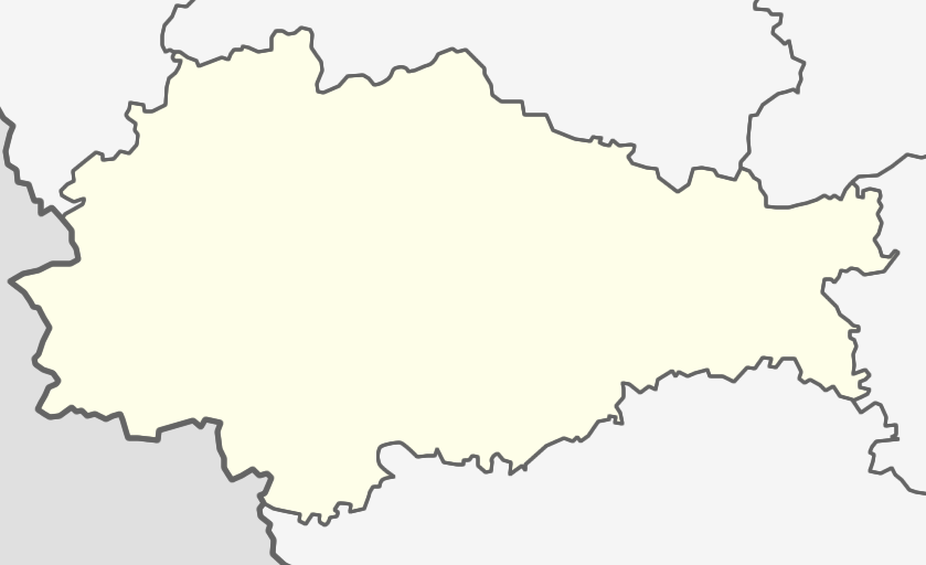 Карта Курской области